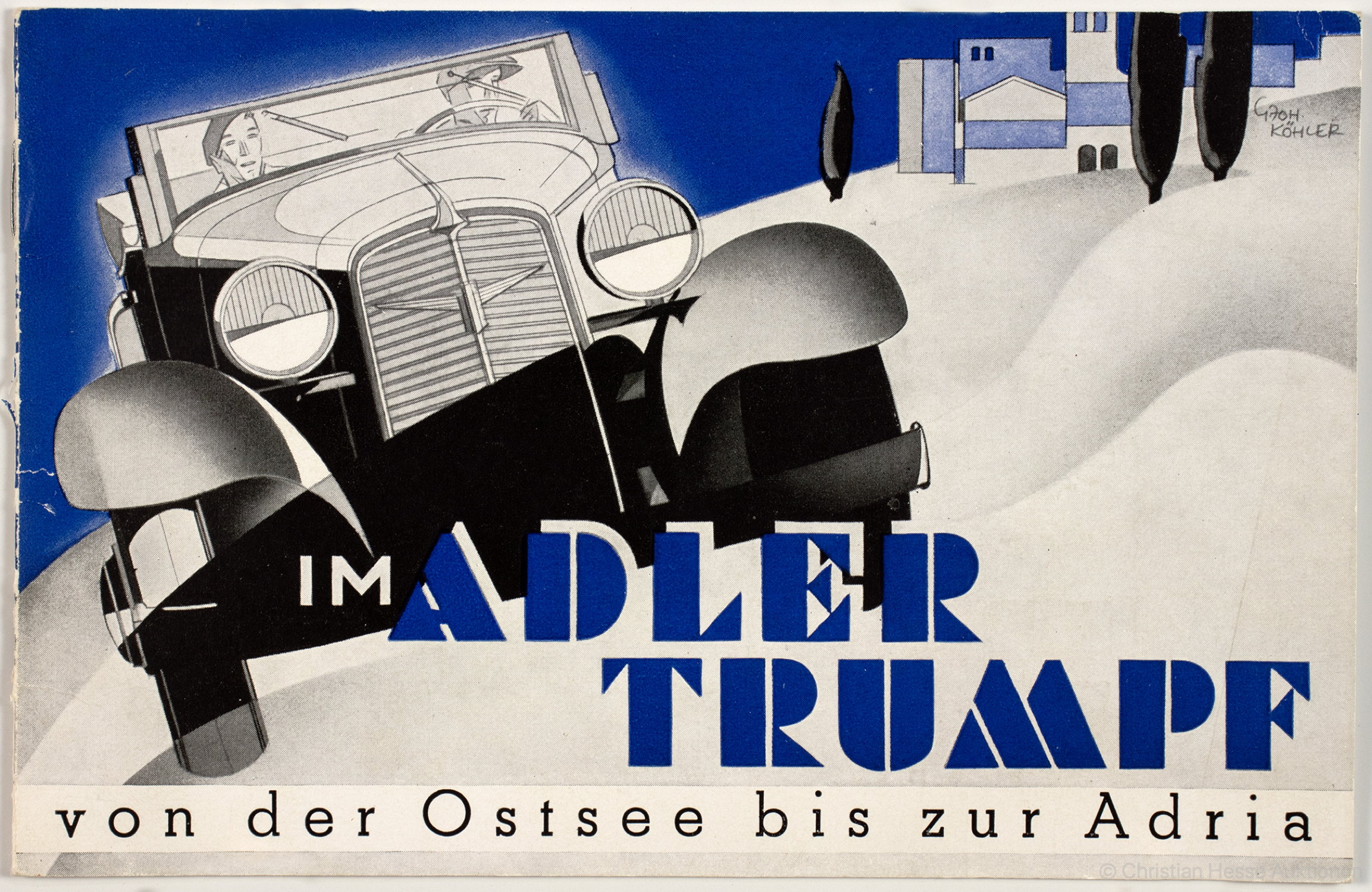 Georg Johann Köhler Im Adler Trumpf von der Ostsee bis zur Adria 1932